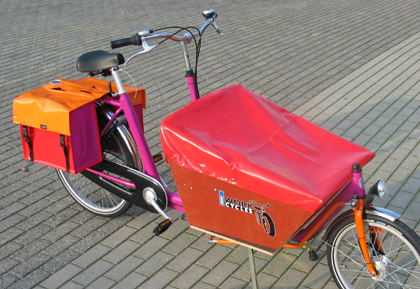 Een Cargobike transportfiets zoals vaak wordt gebruikt voor kindervervoer. Foto van WorkCycles. Uploader heeft deze foto zelf gemaakt. --Workcycles 7 jul 2006 09:28 (CEST)